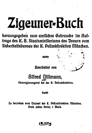 Innentitel von Dillmanns Zigeuner-Buch